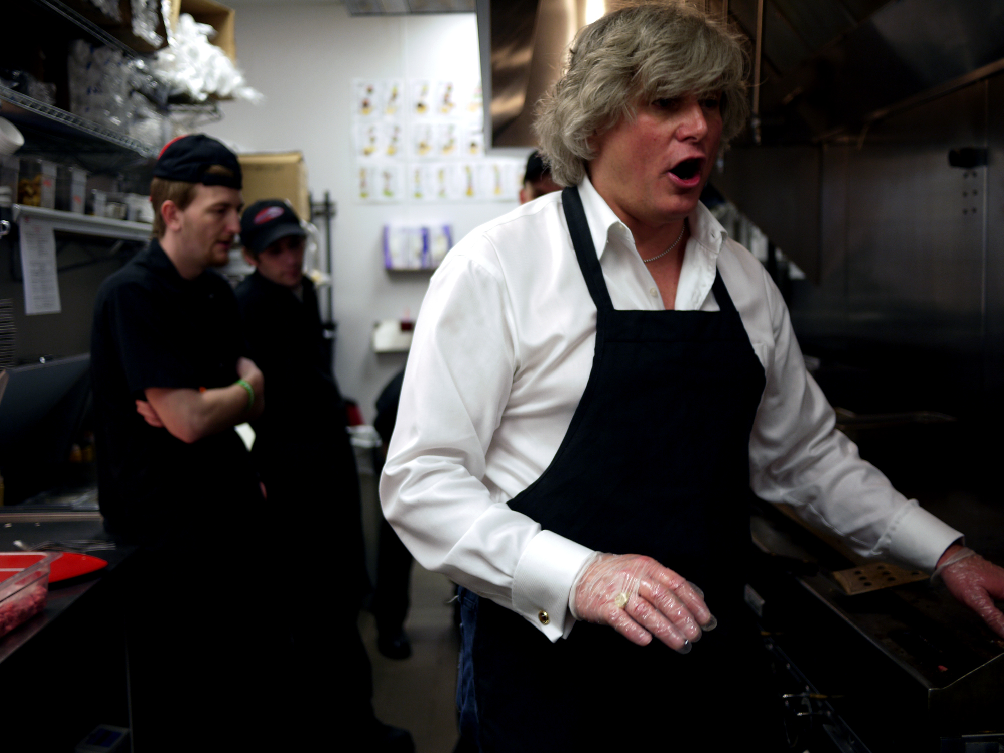 Smashburger